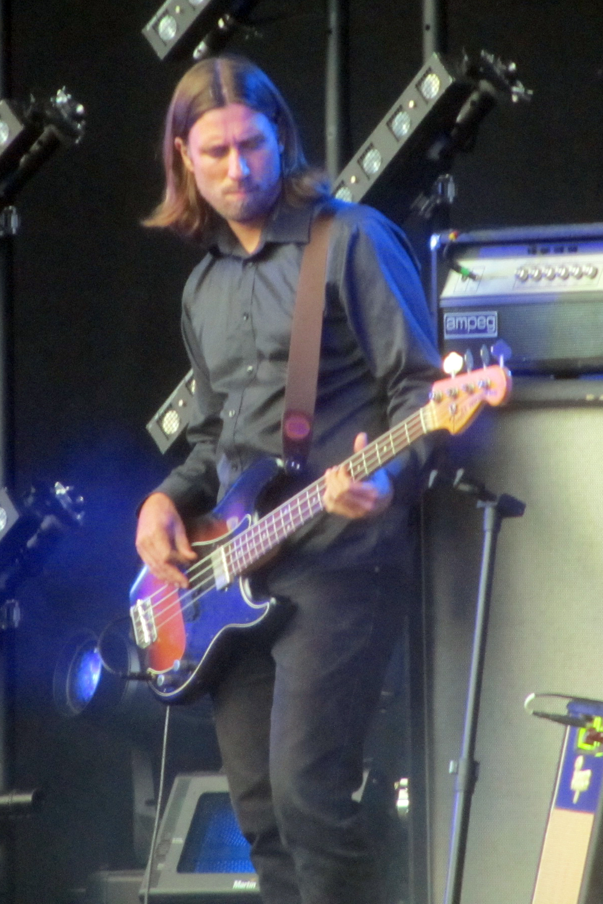 Jeppe Langebek Knudsen fra Sabyia i Tivoli Friheden, Aarhus